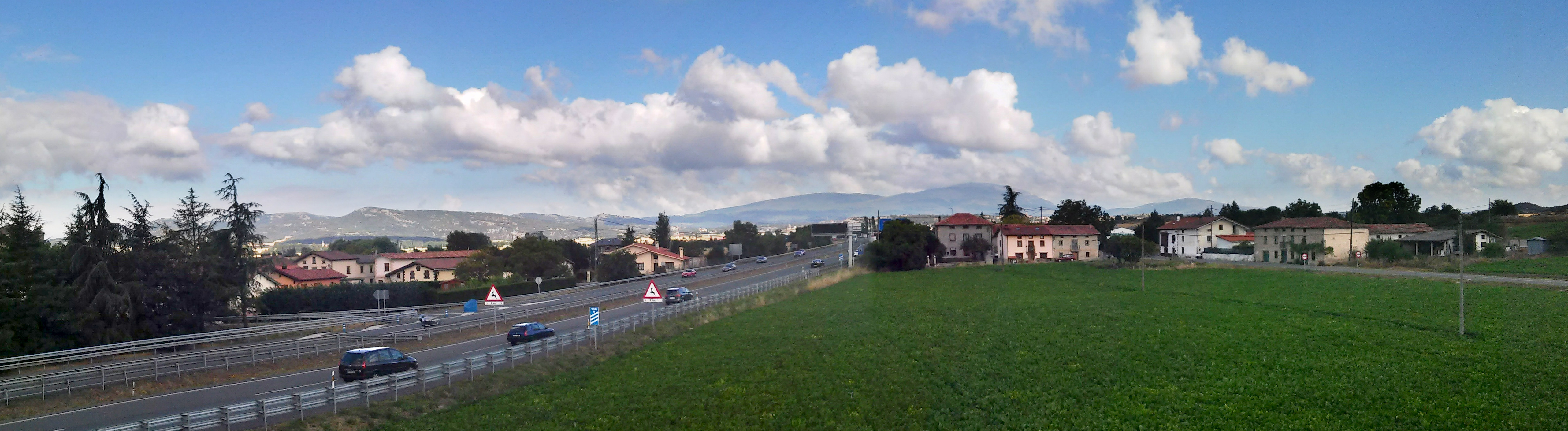 Arangiz (Gasteiz, Araba) herriaren ikuspegia